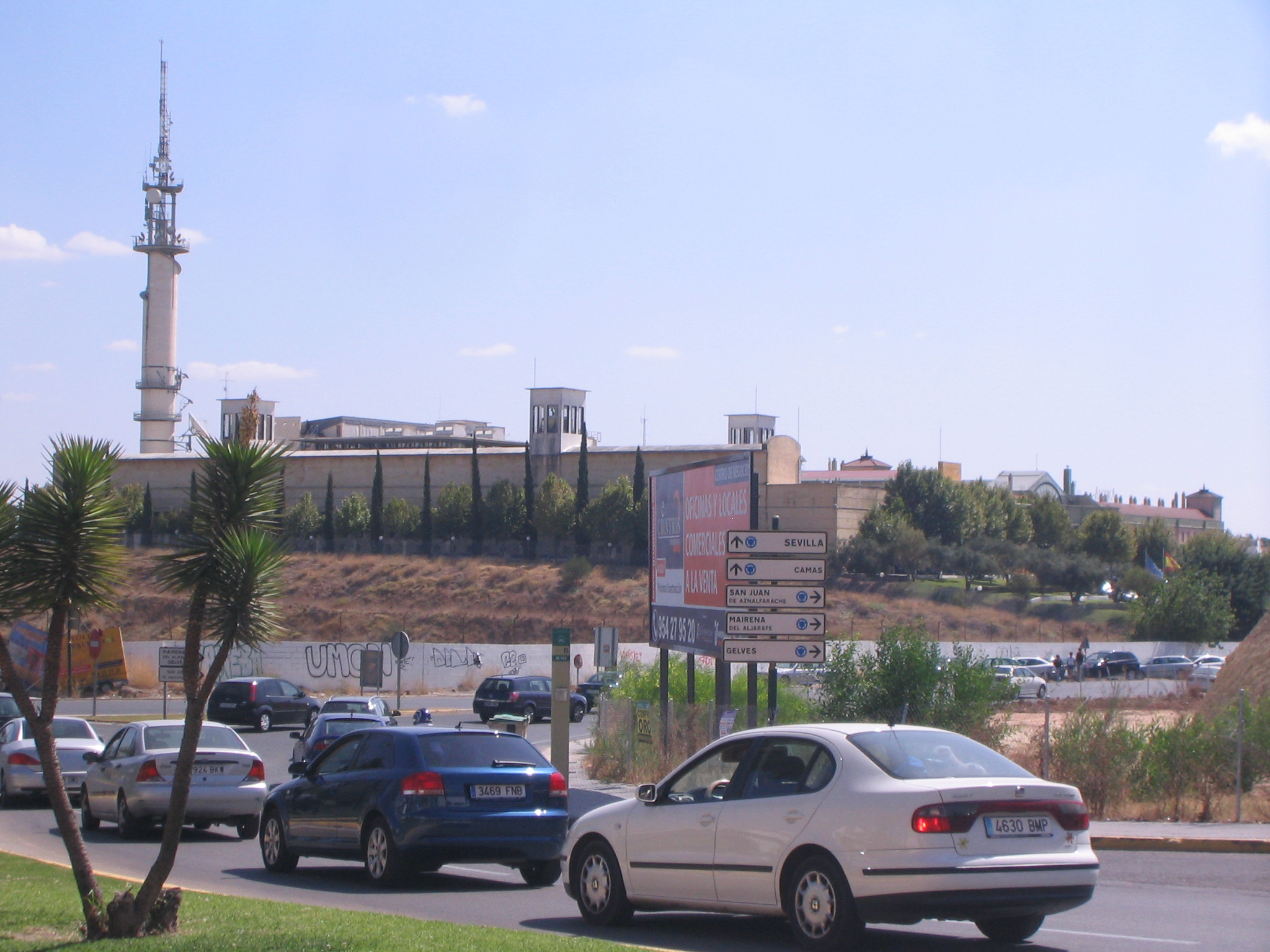 Sede central de la de radio televisión de Andalucía, RTVA, en . San Juan de Aznalfarache (Sevilla).